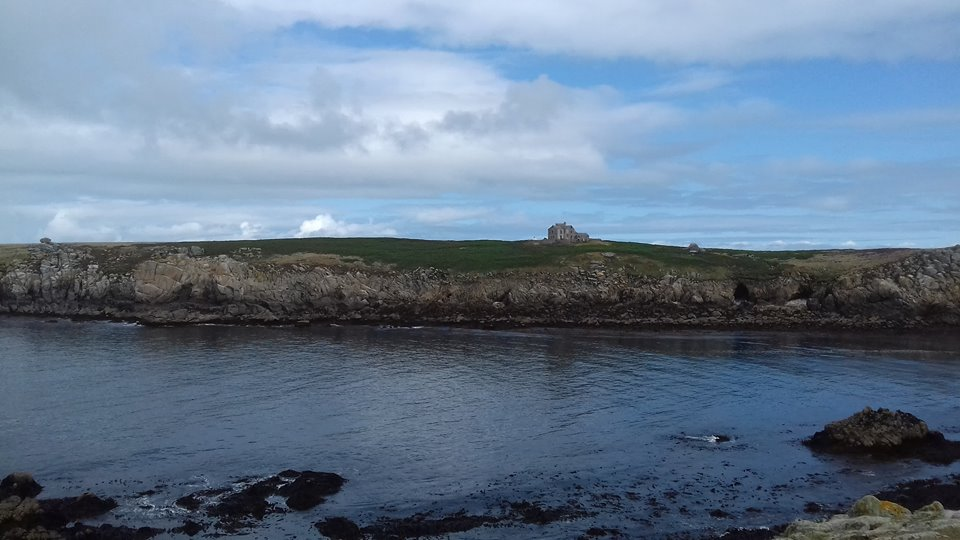 Vue de l'île de Keller avec la seule habitation qui l'occupe